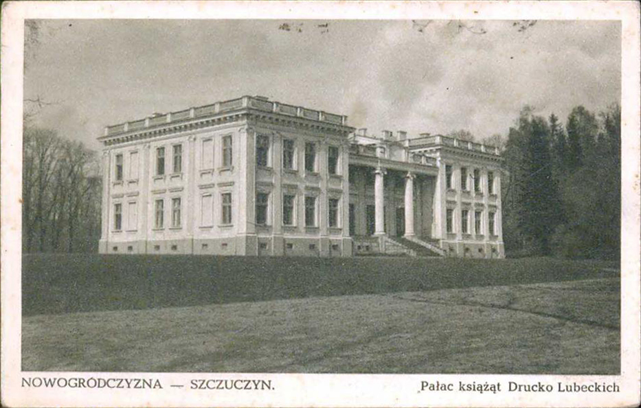 Беларуская (тарашкевіца): Шчучын (Ščučyn), палац Друцкіх-Любецкіх (Drucki-Lubiecki)